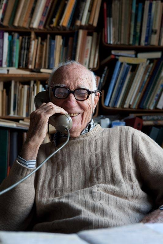 Franco Berlanda